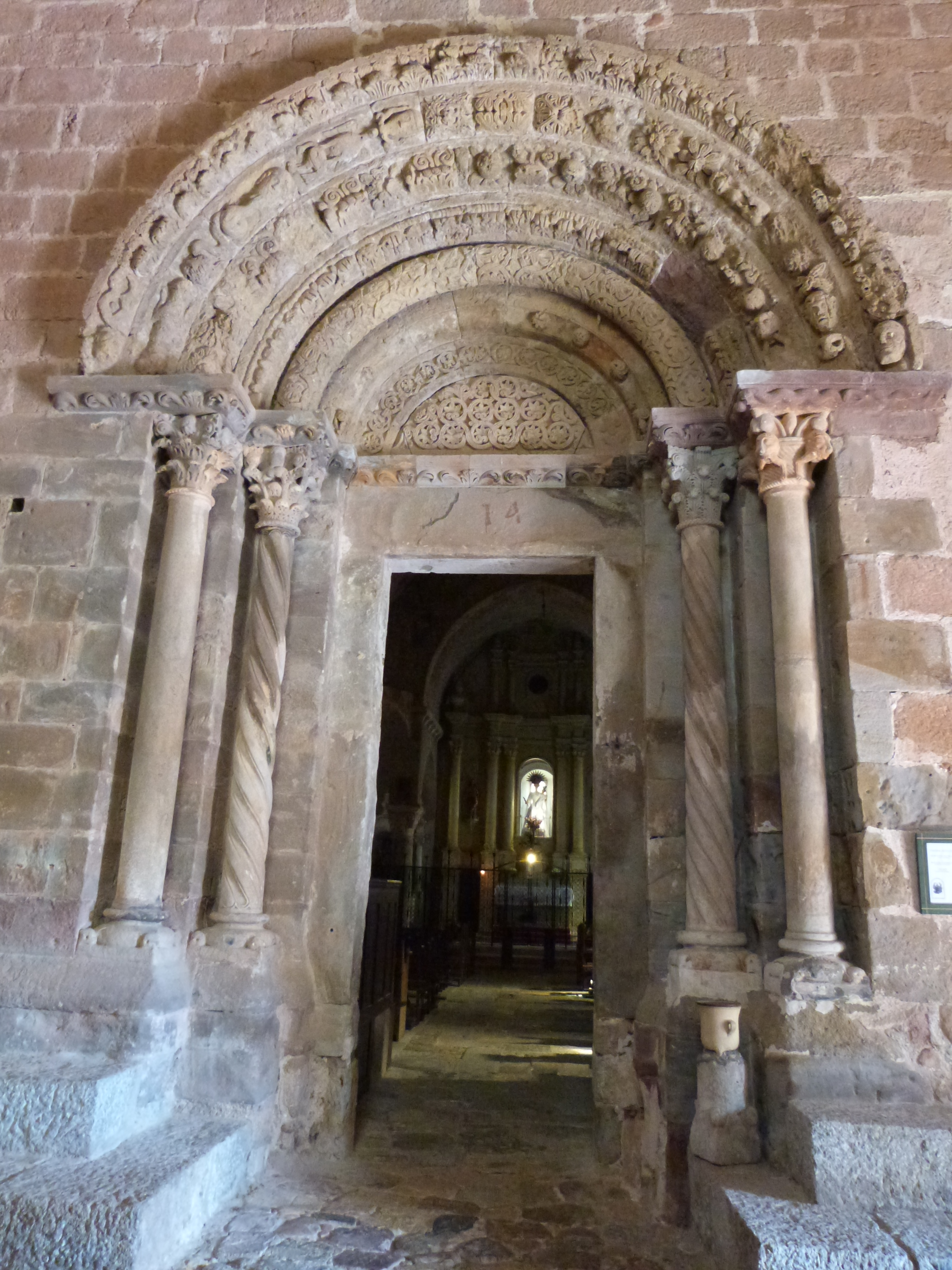 Accès à l'église Sainte-Marie de Coustouges se trouvant dans le narthex